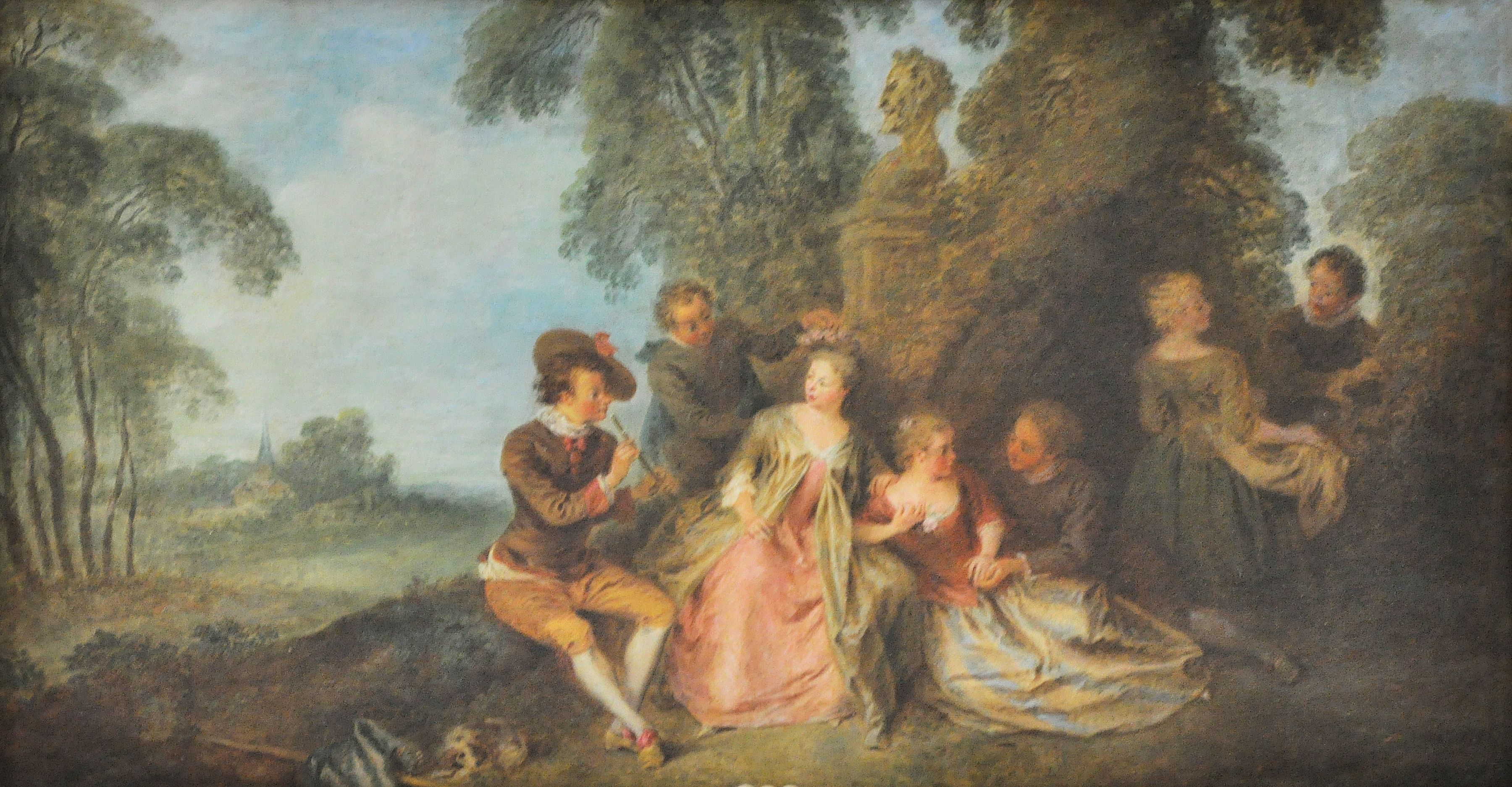 Jean-Baptiste Pater - Le Concert champêtre - v.1720, dessus-de-porte